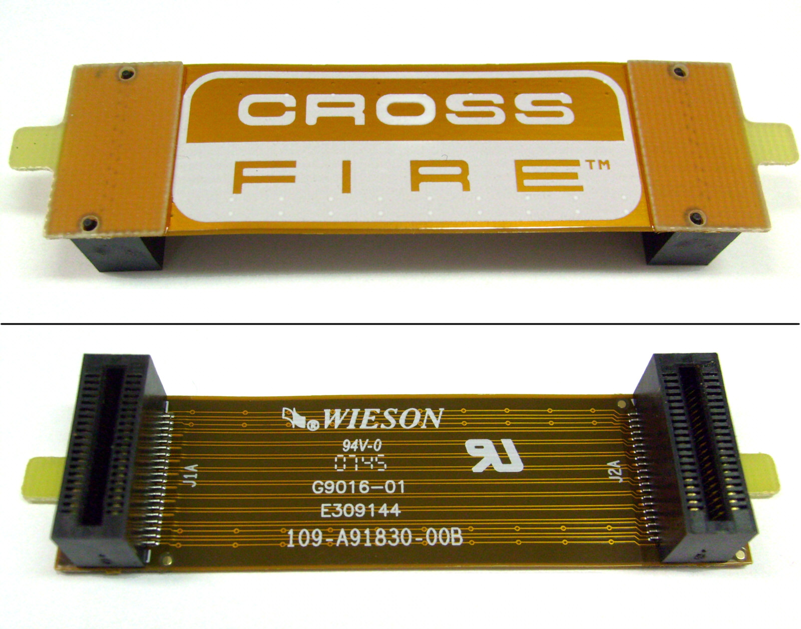 ATI Crossfire-Verbindungskabel